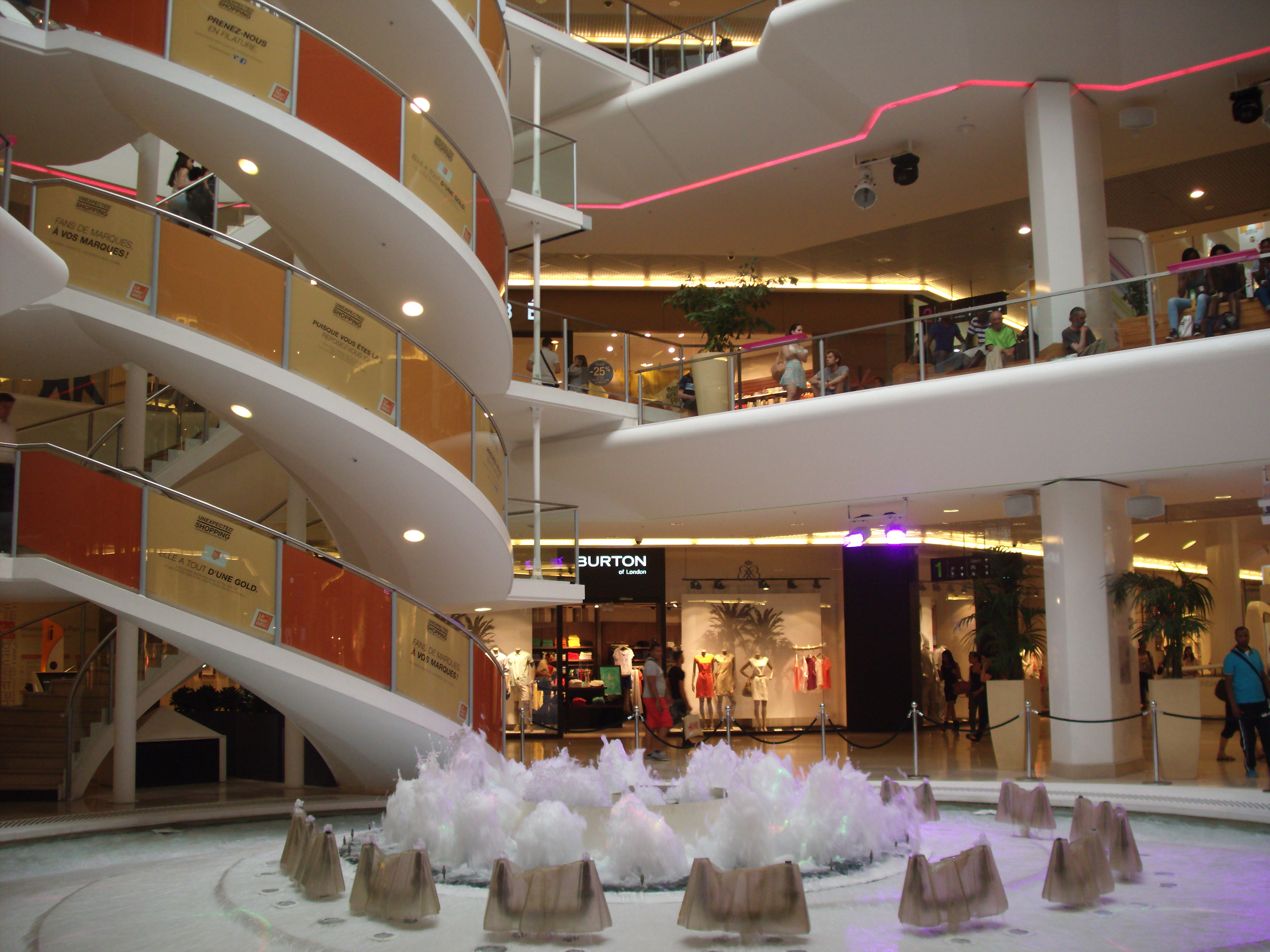 La fontaine au centre du complexe. Son geyser peut monter jusqu'au dernier niveau.